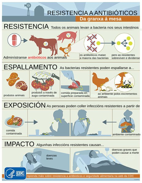 Orixe, espallamento e perigos da resistencia a antibióticos polo CDC de EUA